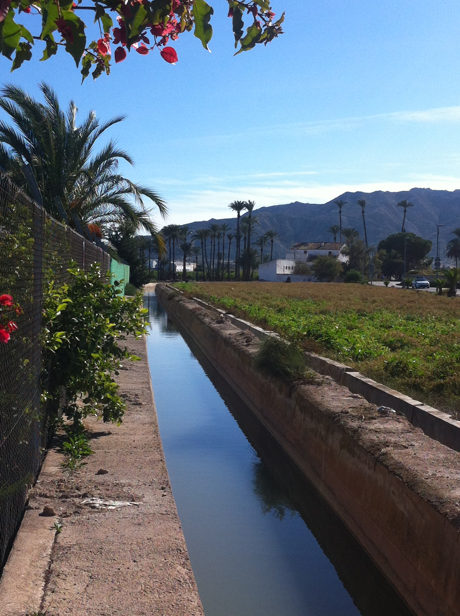 Paraje de la huerta de Murcia (Región de Murcia, España). Acequia con Torre Miralles al fondo. Proximidades de Los Ramos (Murcia).